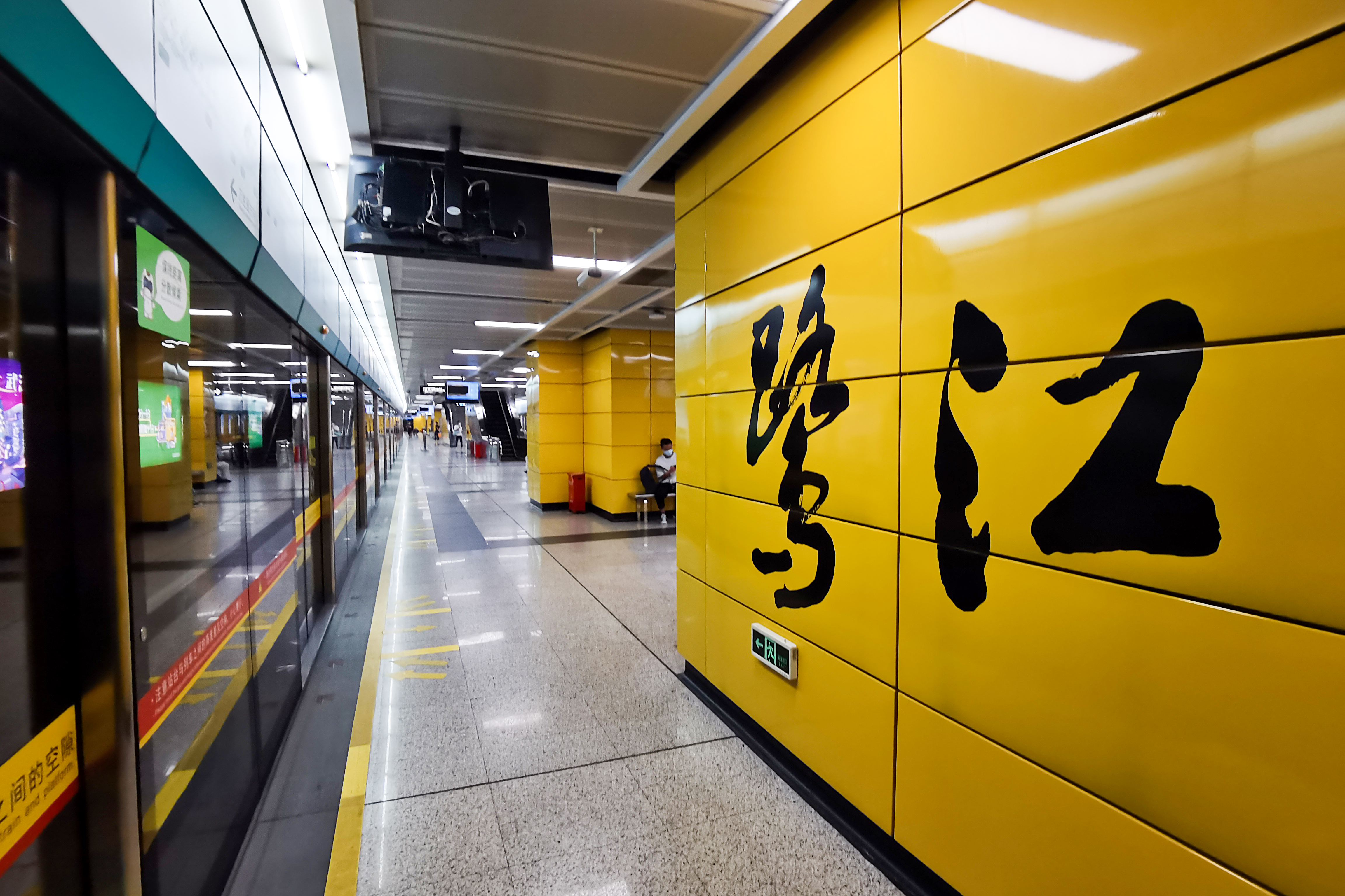 广州地铁鹭江站